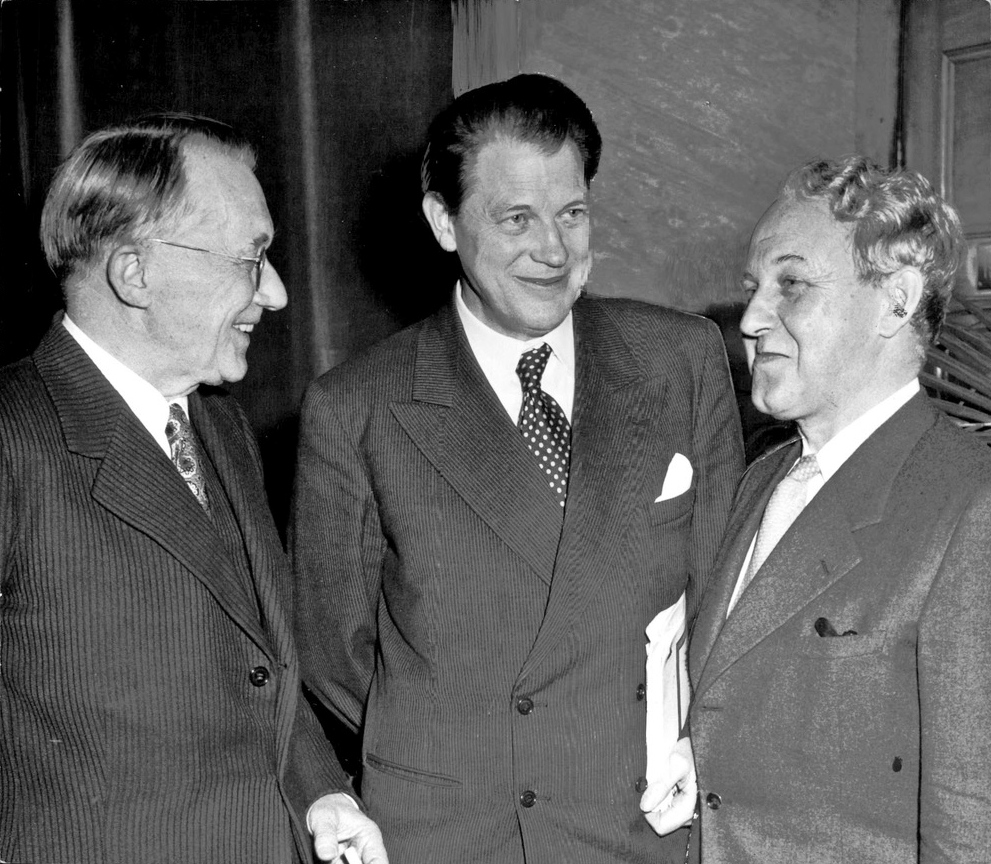 Nils Hänninger, Harry Martinson och Gustaf Näsström diskuterar frågan: Kan slangen förnya språket?"Vad gäspar skorpan?" frågade Harry Martinsson på Publicistklubben på onsdagskvällen. Han fick inget svar. Ändå vimlade Bella Venezia av språkexperter. Enbart vid honnörsbordet satt fyra andra medlemmar av Svenska Akademien: Nils Ahnlund, Henry Olsson, Elias Wessén och Anders Österling. Vidare dr. Nils Hänninger och docent Gösta Bergman i Nämnden för svensk språkvård. Slutligen den nyutnämnde professorn i svenska språket vid Stockholms högskola Carl Ivar Ståhle. När alla teg fick Martinsson lov att upprepa sin fråga på vanlig svenska: Vad kan klockan vara? Han svarade själv: Vad klockan än kan vara, så är den slagen för slangen. Ingenting kan mindre förnya språket än den.